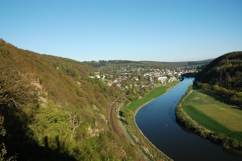 Blick von den Hannoverschen Klippen auf den Kurort Bad Karlshafen